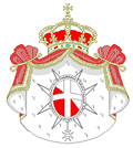 Magisztrátusi Ház Címere